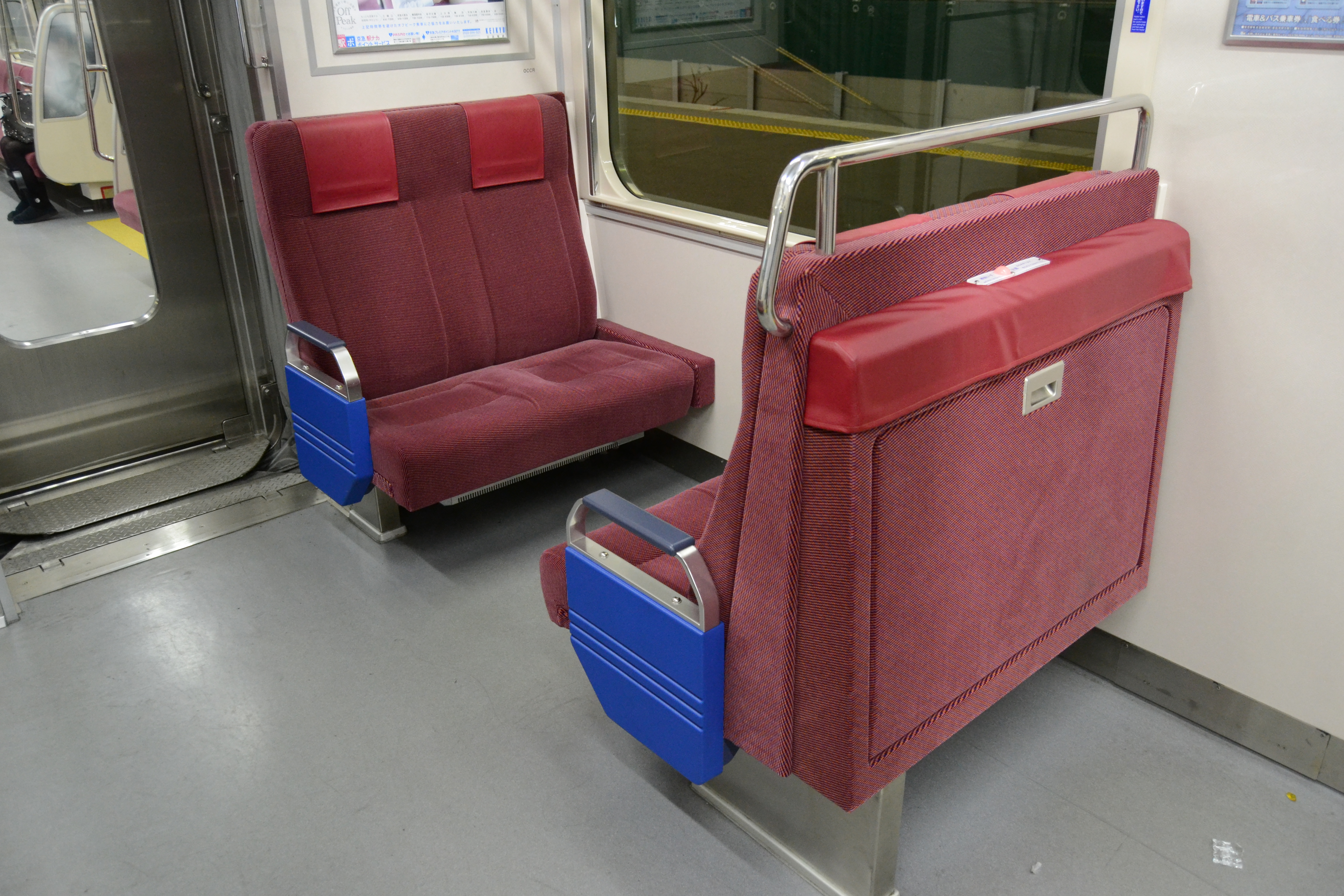 京急1000形（2代）1600番台の車端の片側に設置されたボックスシート。